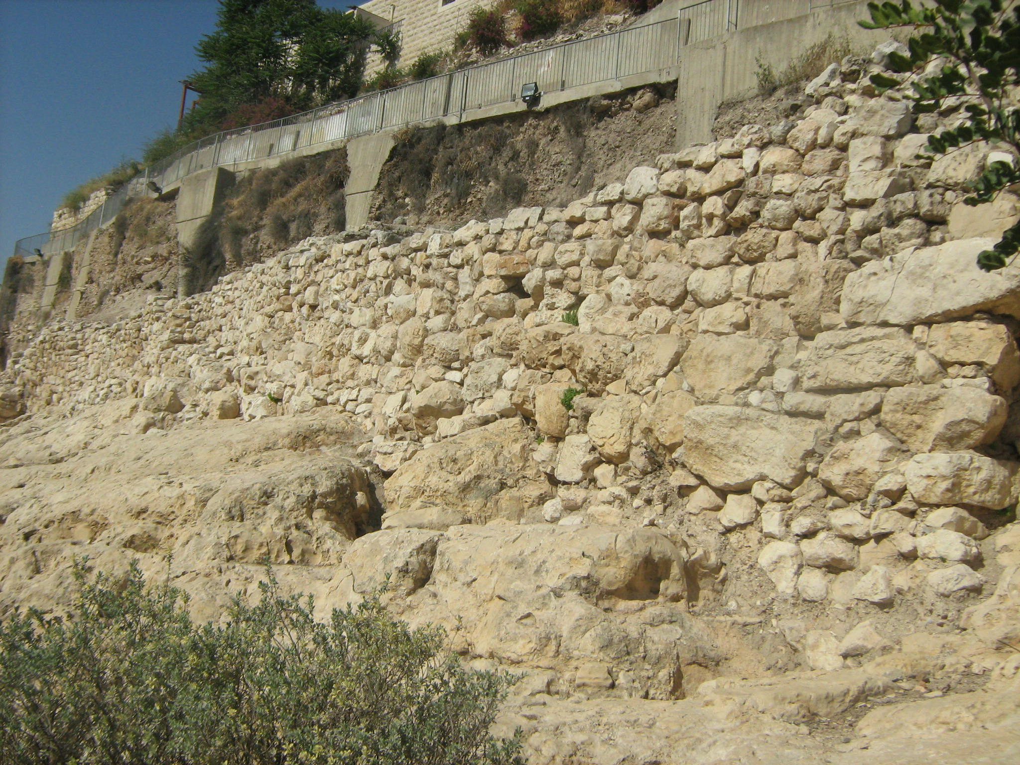 Город Давида-стены города участок Е